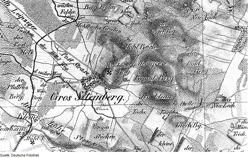 Original image description from the Deutsche Fotothek Parthenstein-Großsteinberg. Oberreit, Sect. Leipzig, 1836/39